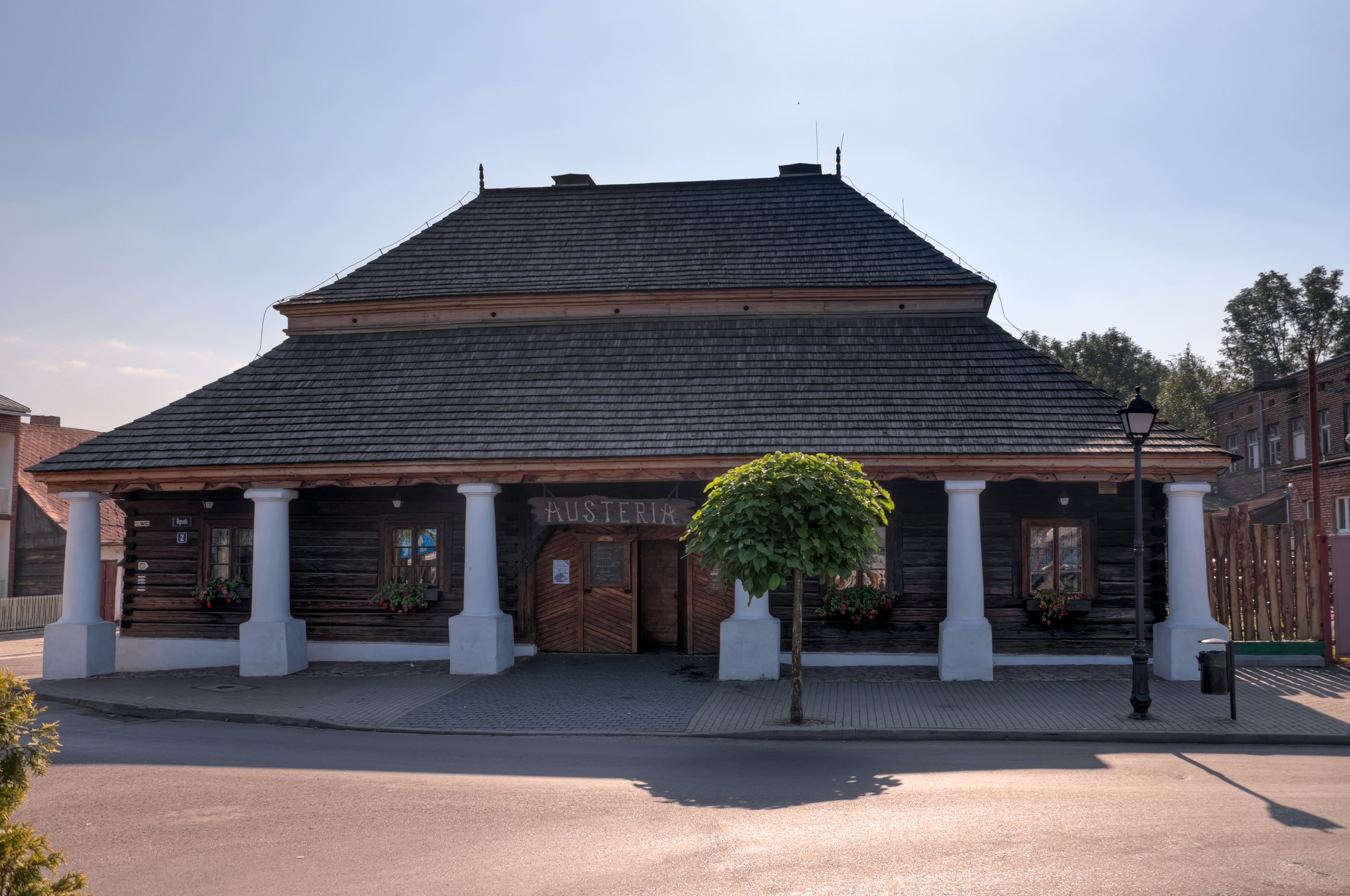 Budynek dawnej karczmy zwanej Austerią, drewniany, z podcieniem, wzniesiony w 1771 r w Sławkowie